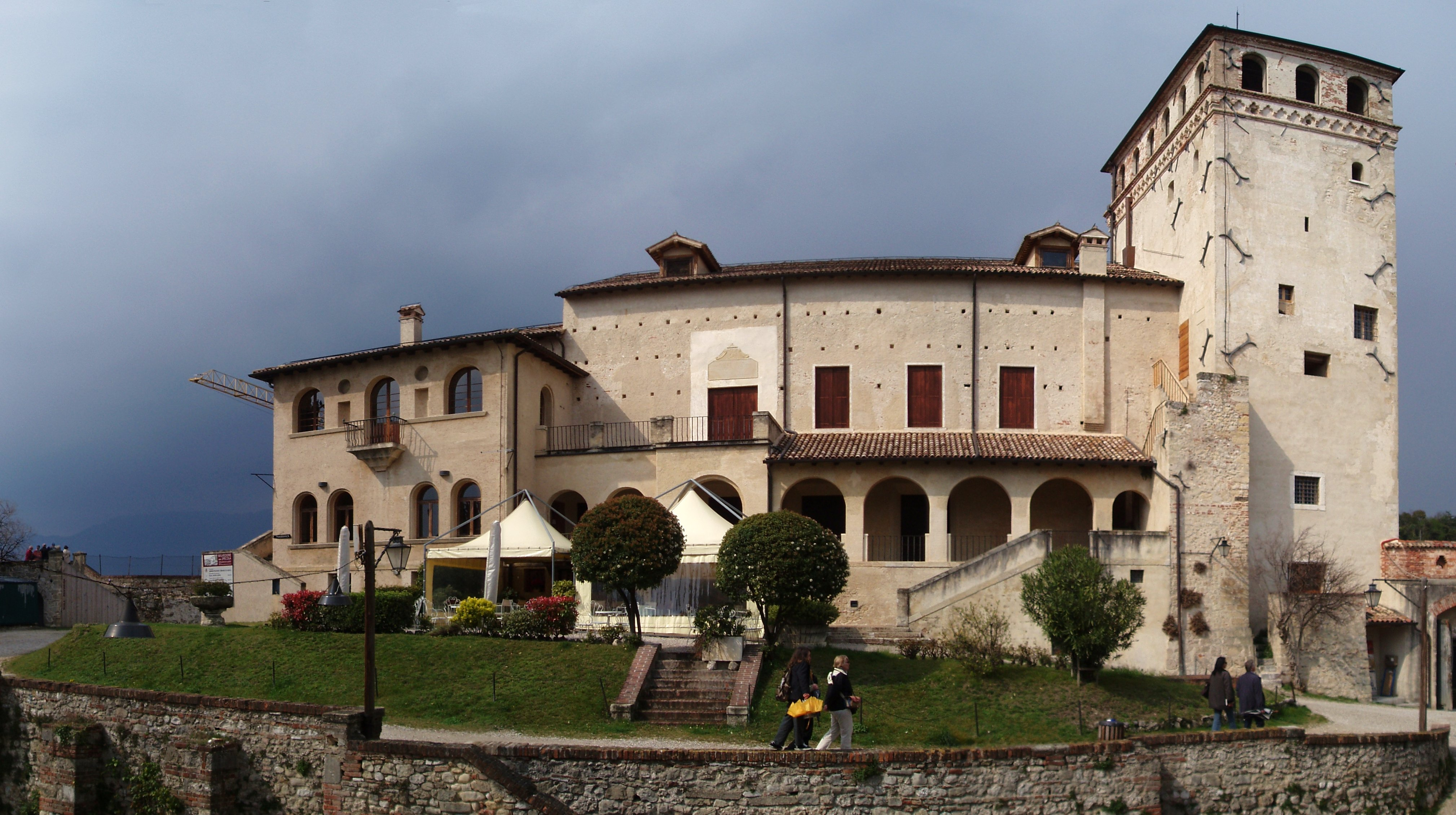 Il Castello della Regina Caterina Cornaro, Asolo, Italy